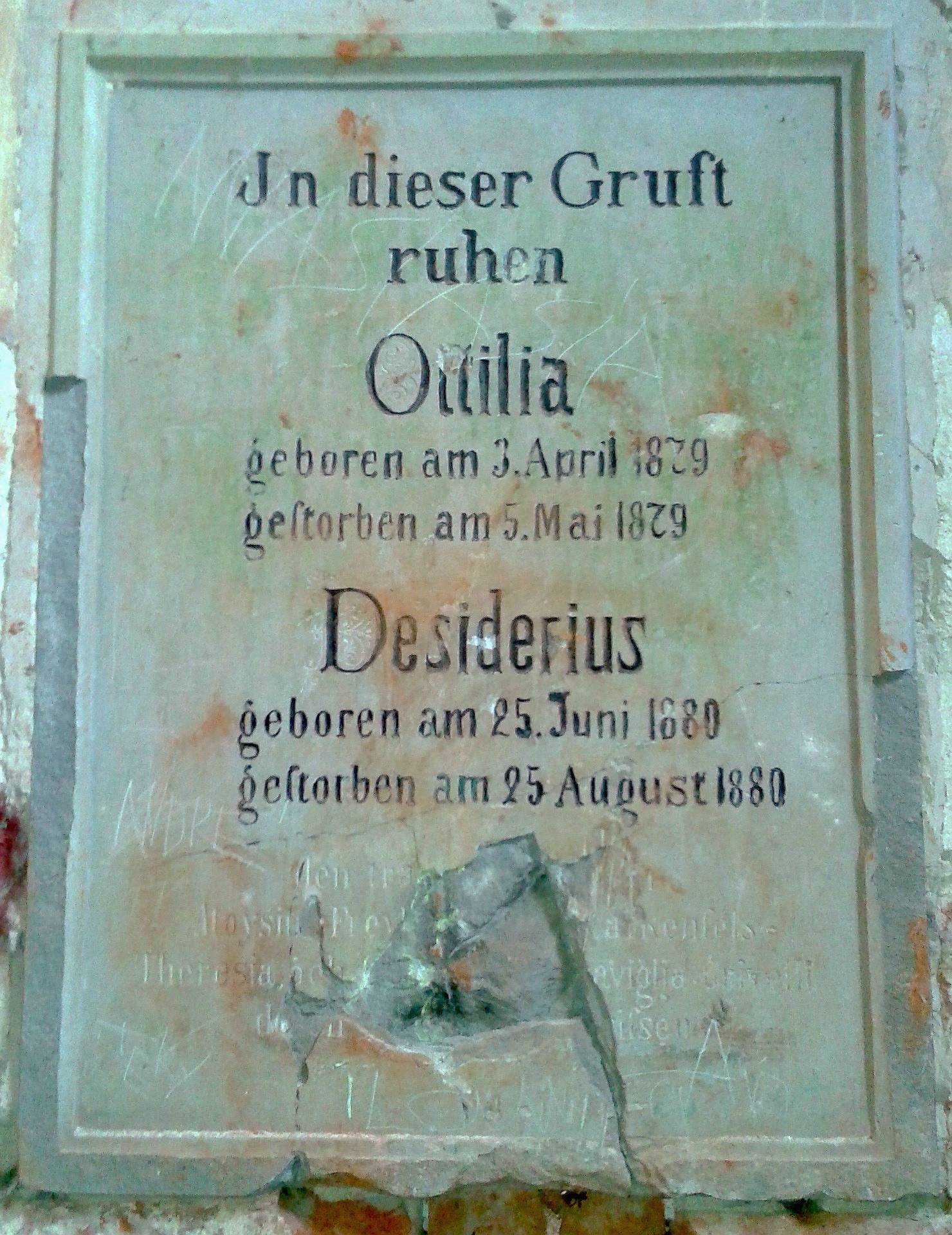 Epitaph für zwei Kinder aus der freiherrlichen Familie Weiß von Starkenfels in der ehemaligen Gruftkapelle der Grafen Tauffkirchen-Kleeberg in Trostling bei Ruhsdorf an der Rott, Niederbayern